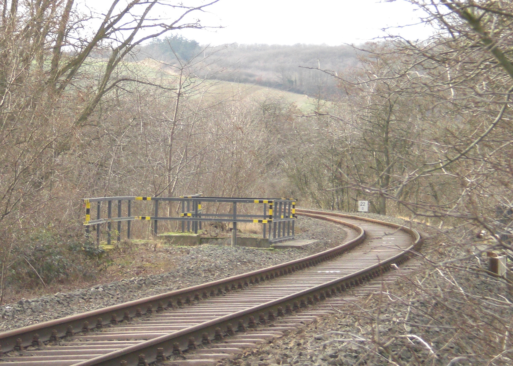 Trasse der Donnersbergbahn bei Streckenkilometer 21,9; Blickrichtung Nordwest